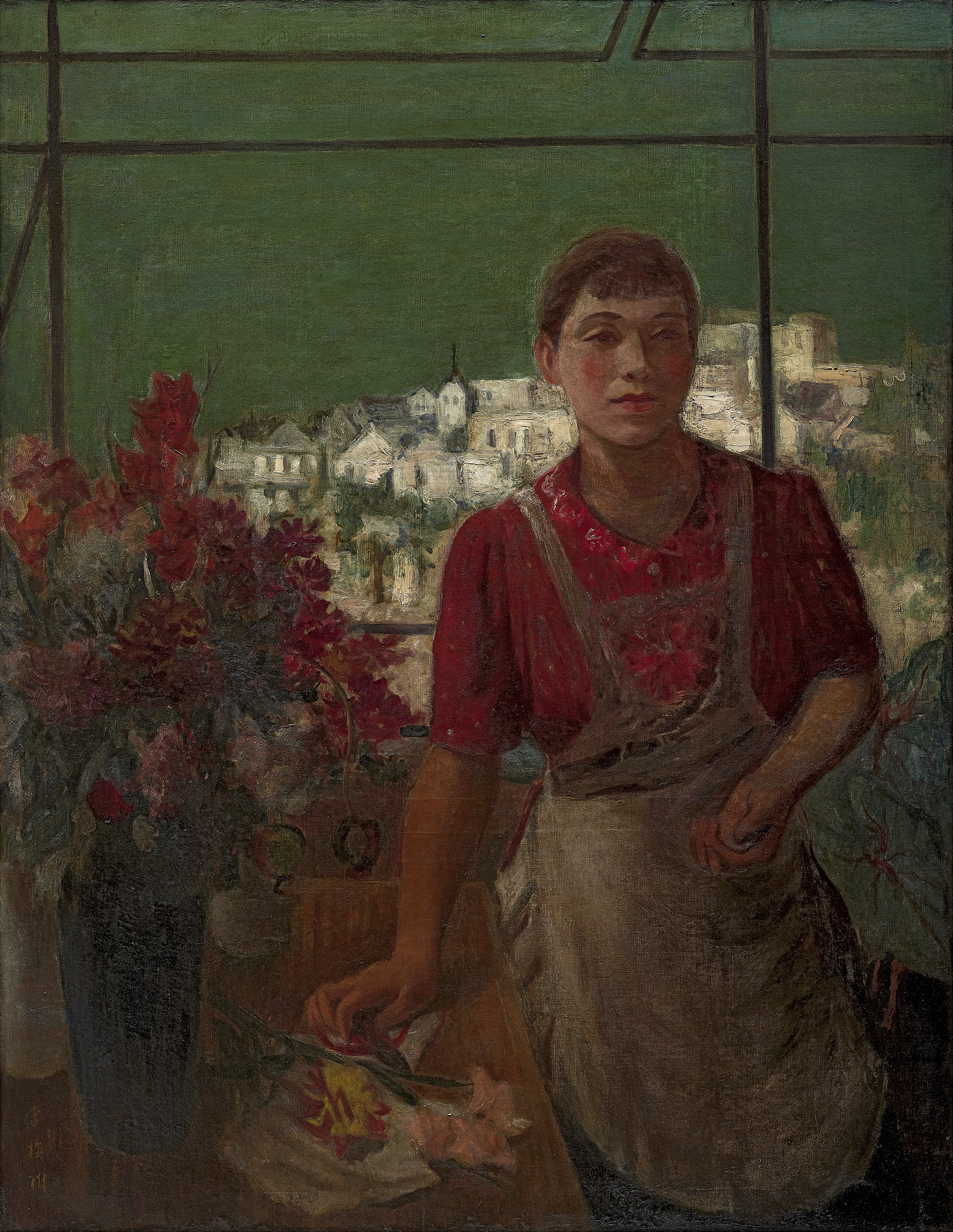 花與女，1940年，油畫。 《花與女》入選日本第四屆新文展覽 (日本開國2600年奉祝展) ，表現女性插花的生活之美，人物與花的暖色調與遠景天空的綠色調恰成對比，中景的米黃色建築物過渡與銜接近景、遠景的功能。暗色直線或斜線窗柱，則增加了空間感與律動感。